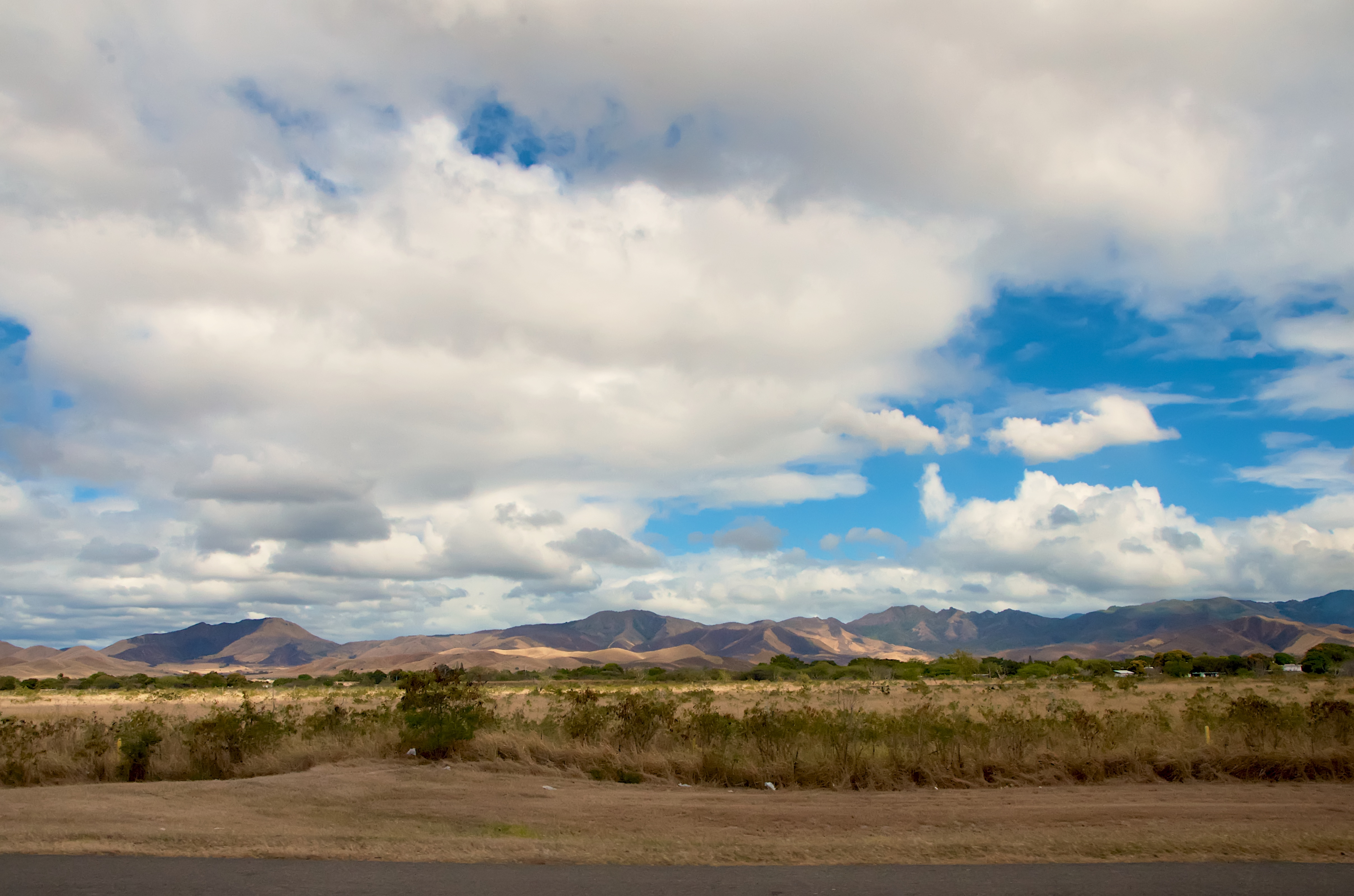 Jauca 2, Santa Isabel, Puerto Rico